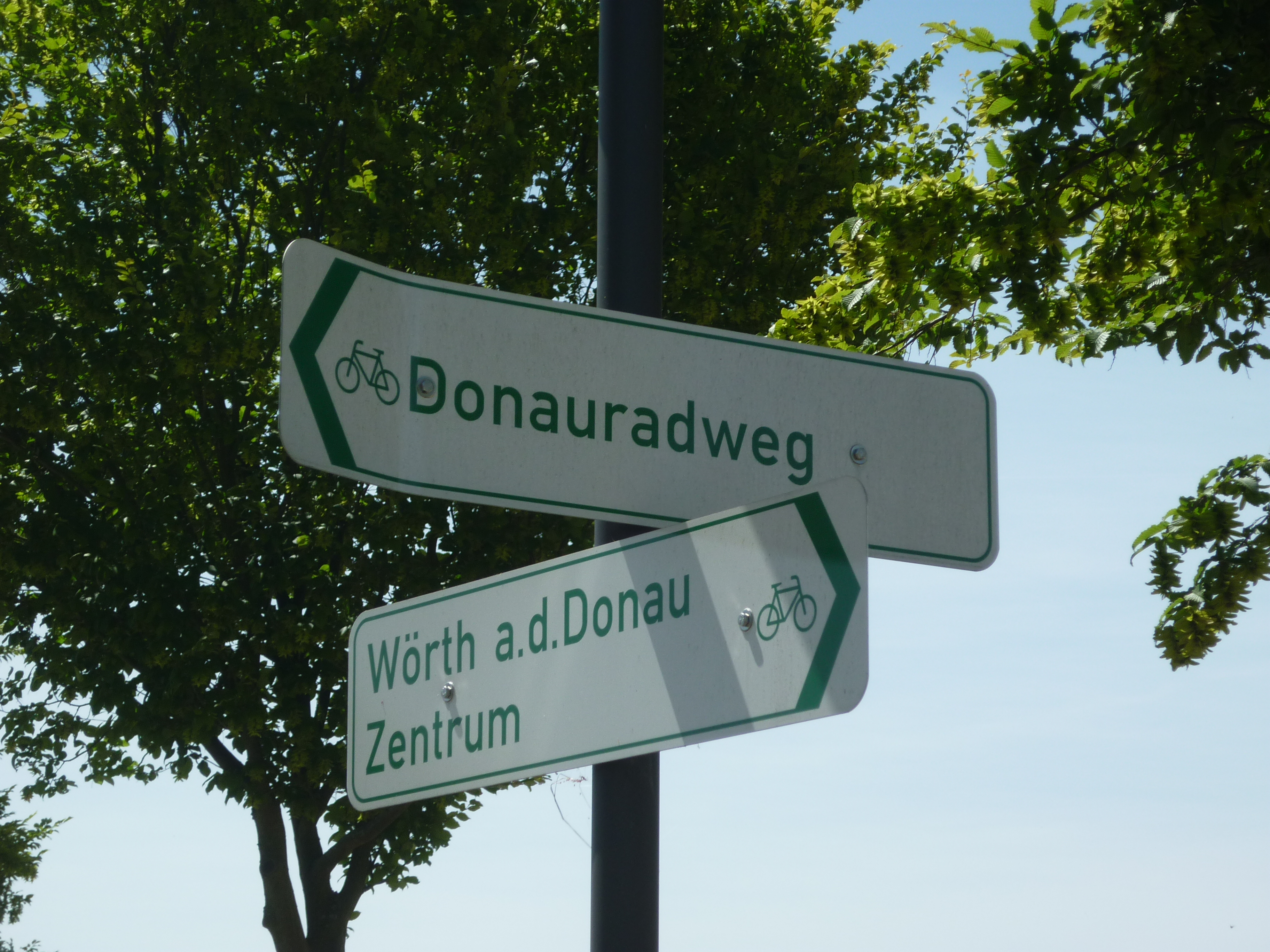 Donauradweg Wörth an der Donau Zentrum